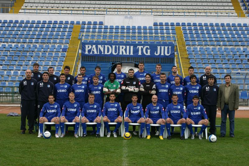 Echipa Pandurii Targu-Jiu in noiembrie 2006